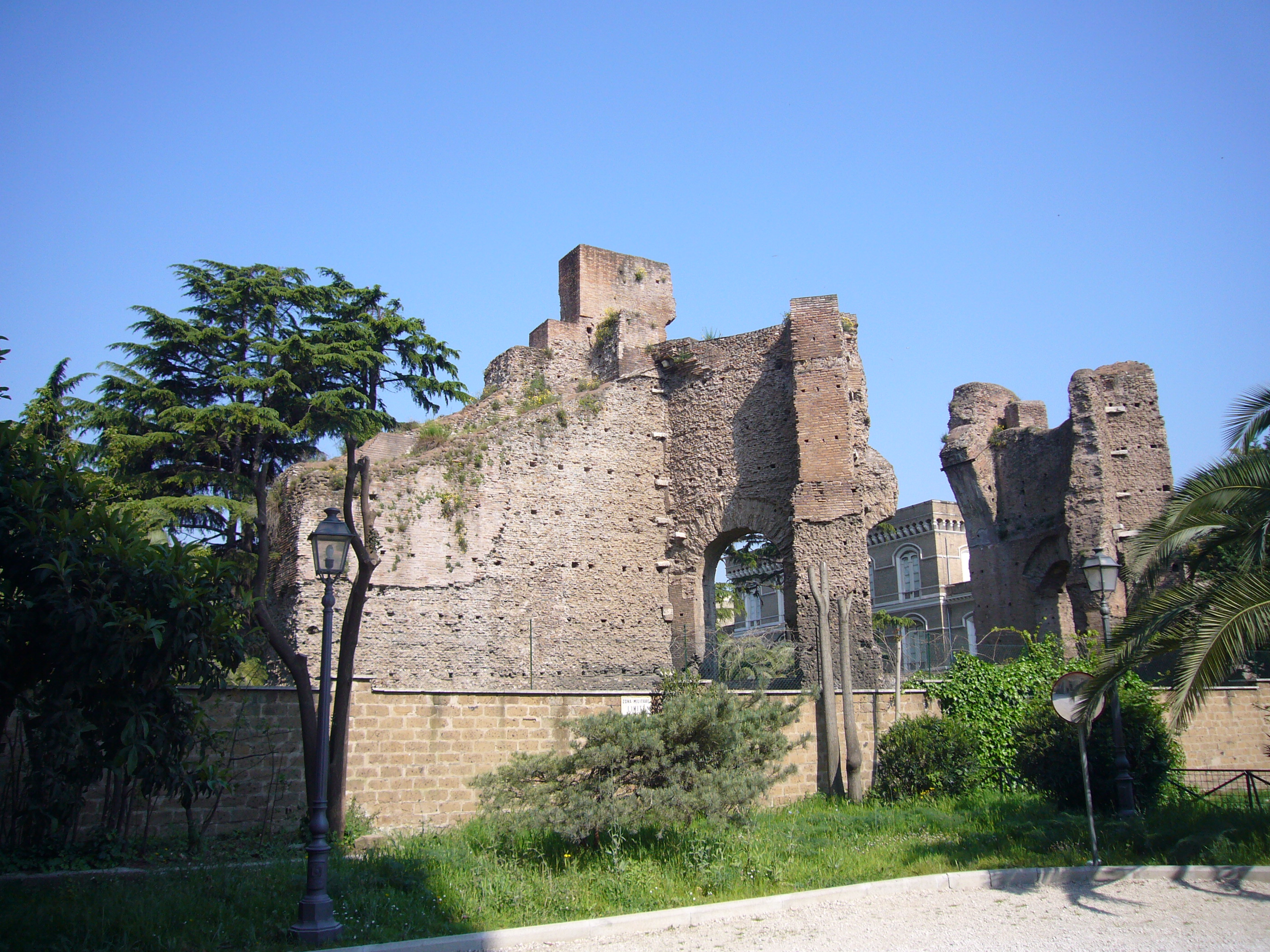 Roma, Santa Croce in Gerusalemme, resti del Sessorium, il c.d. Tempio di Venere e Cupido.